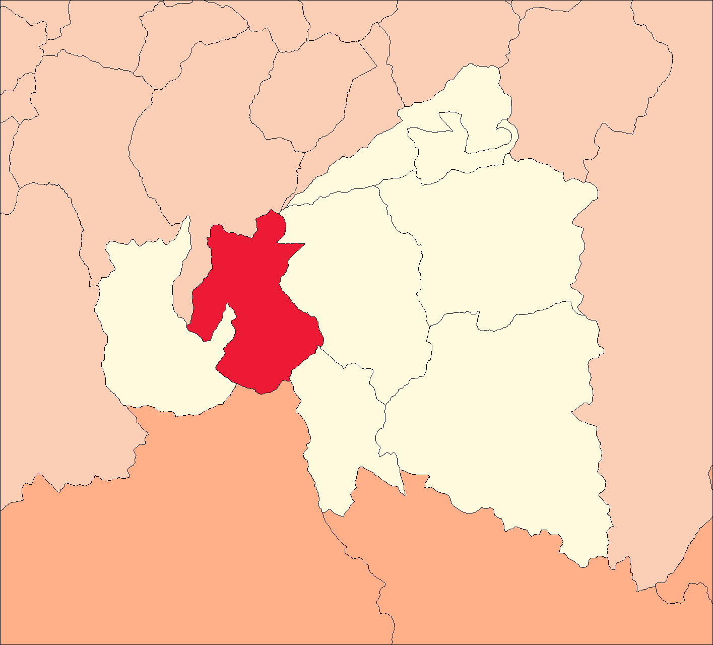 Área del distrito de Cayna.